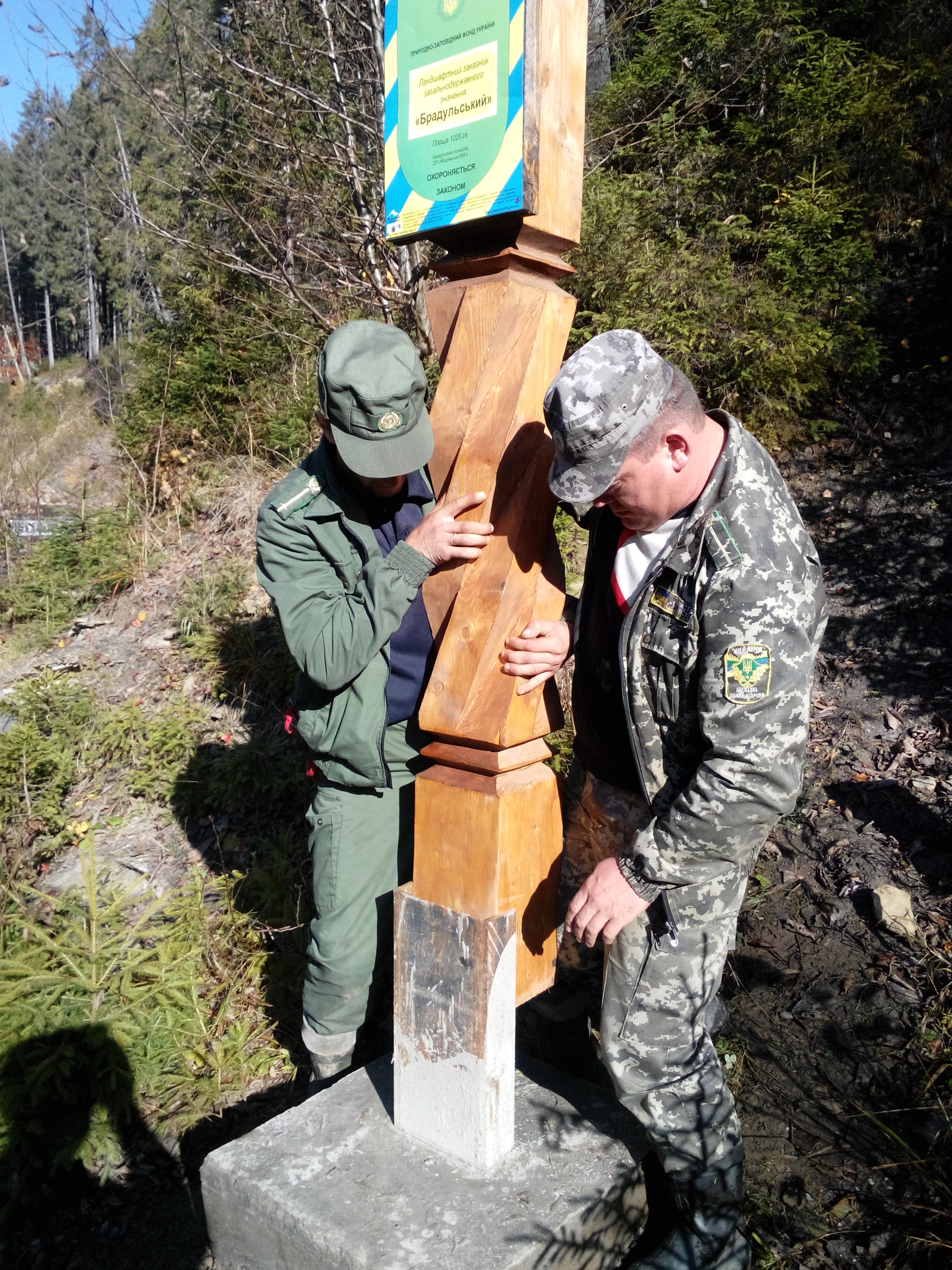 Встановлення знака в ур. Лижньовка